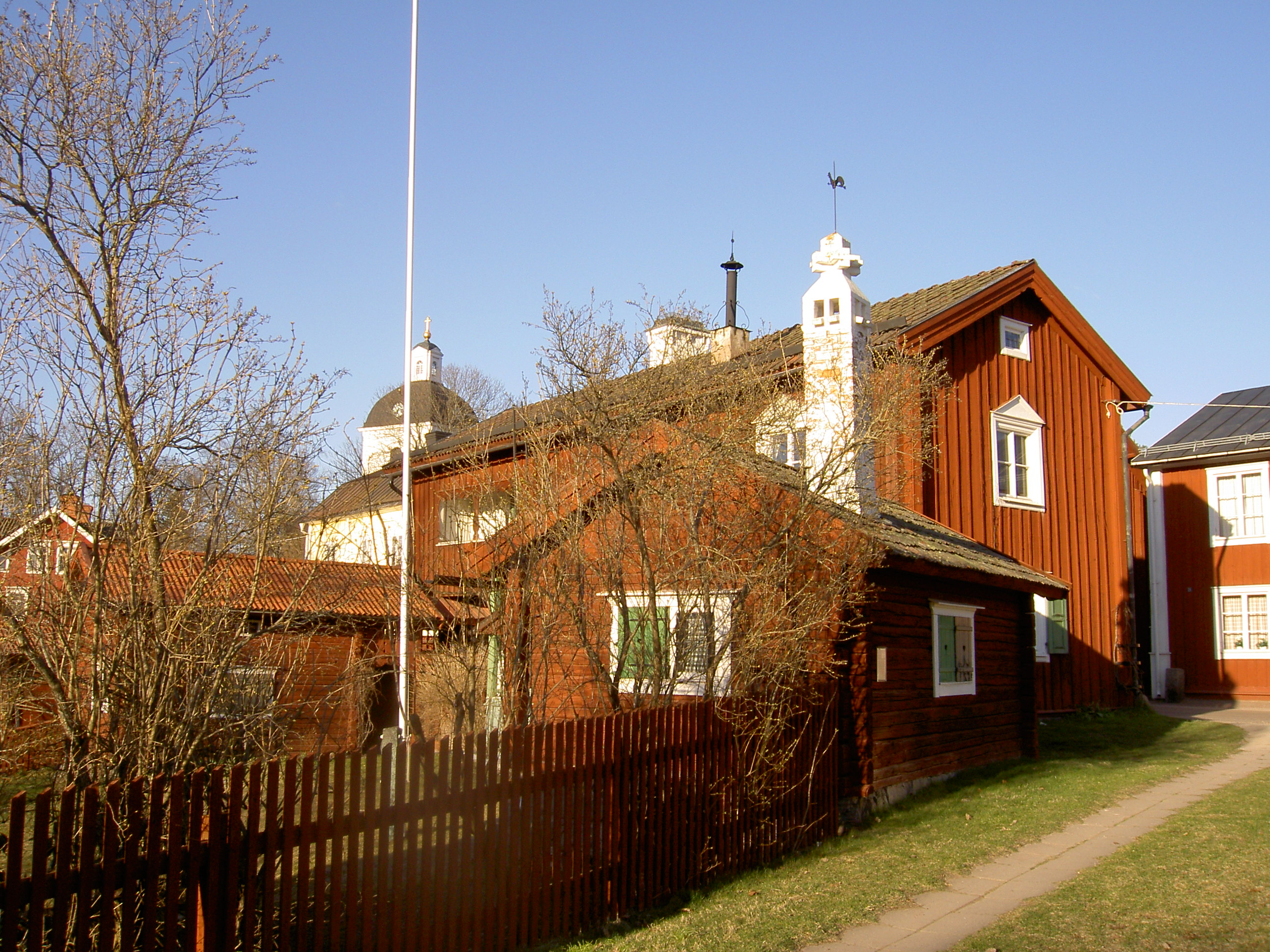 Dahlanders hörn/Litslegården/Malmlings gård (kvarteret Jumbo). Säters första myntverk låg på denna plats på 1620-talet, men gården är från 1700-talet. Säters kyrka i bakgrunden.